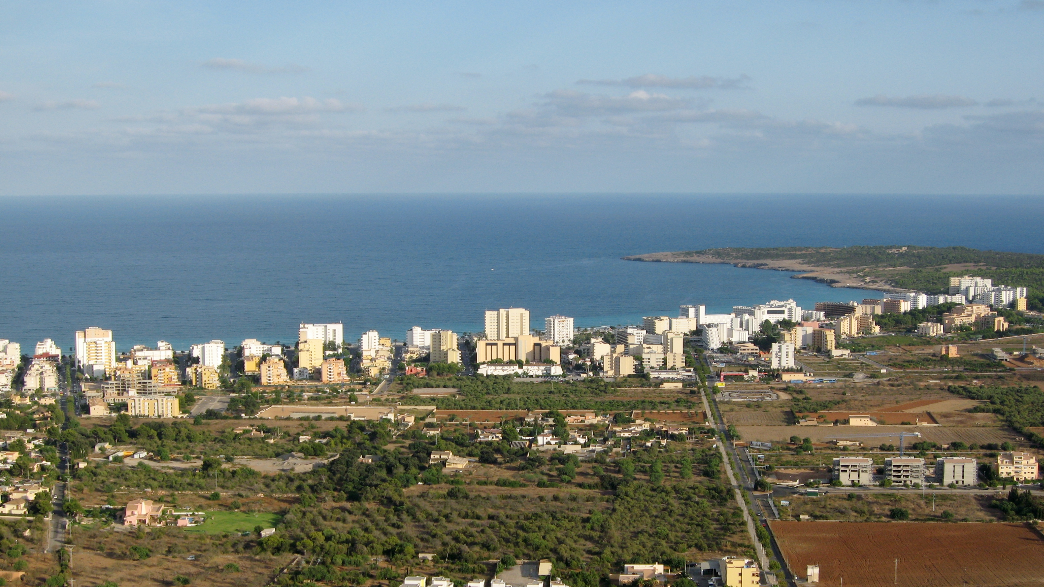 Blick auf Cala Millor, Gemeinde Son Servera, vom Berg Na Penyal, Mallorca, Spanien